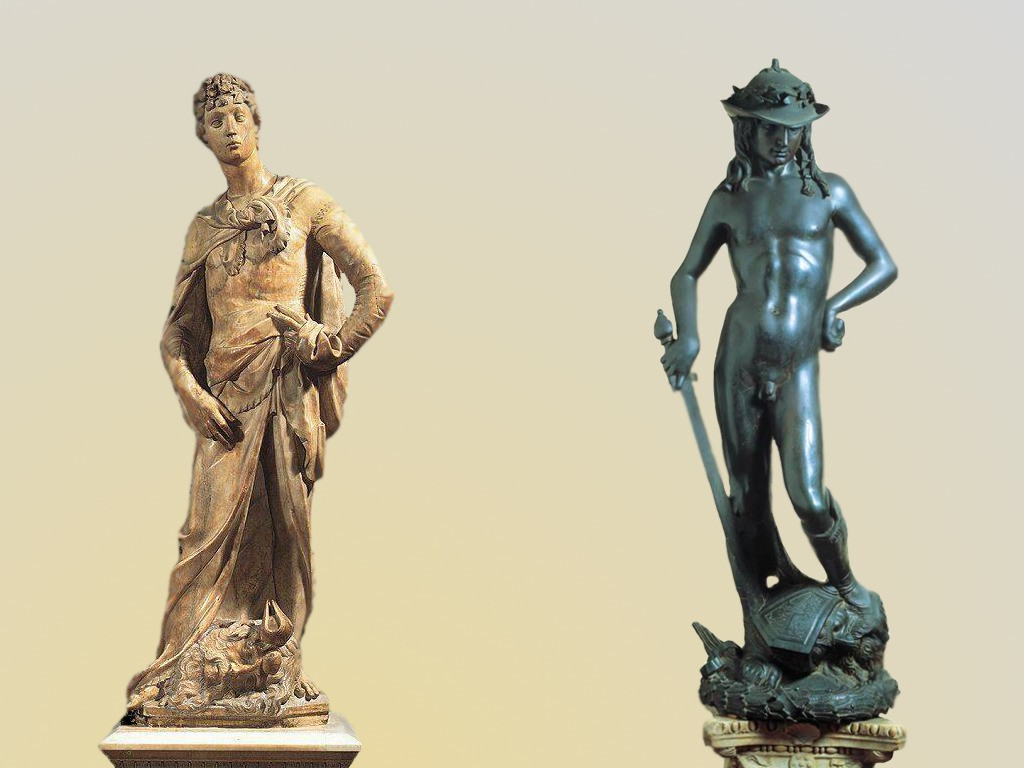 Confronto fra i David di Donatello